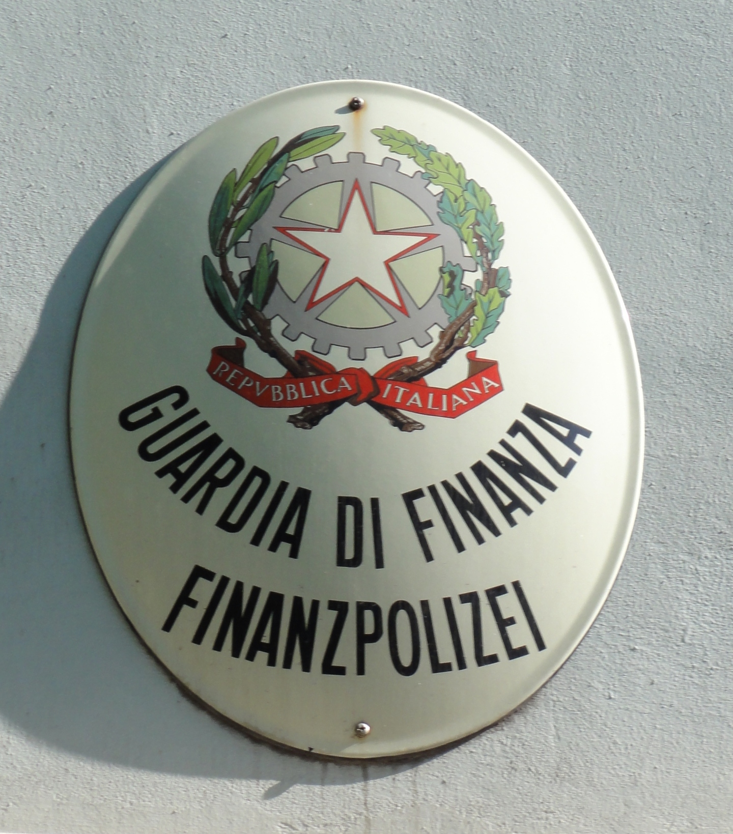 Bozen-Bolzano — Guardia di Finanza (zweisprachiges Schild)